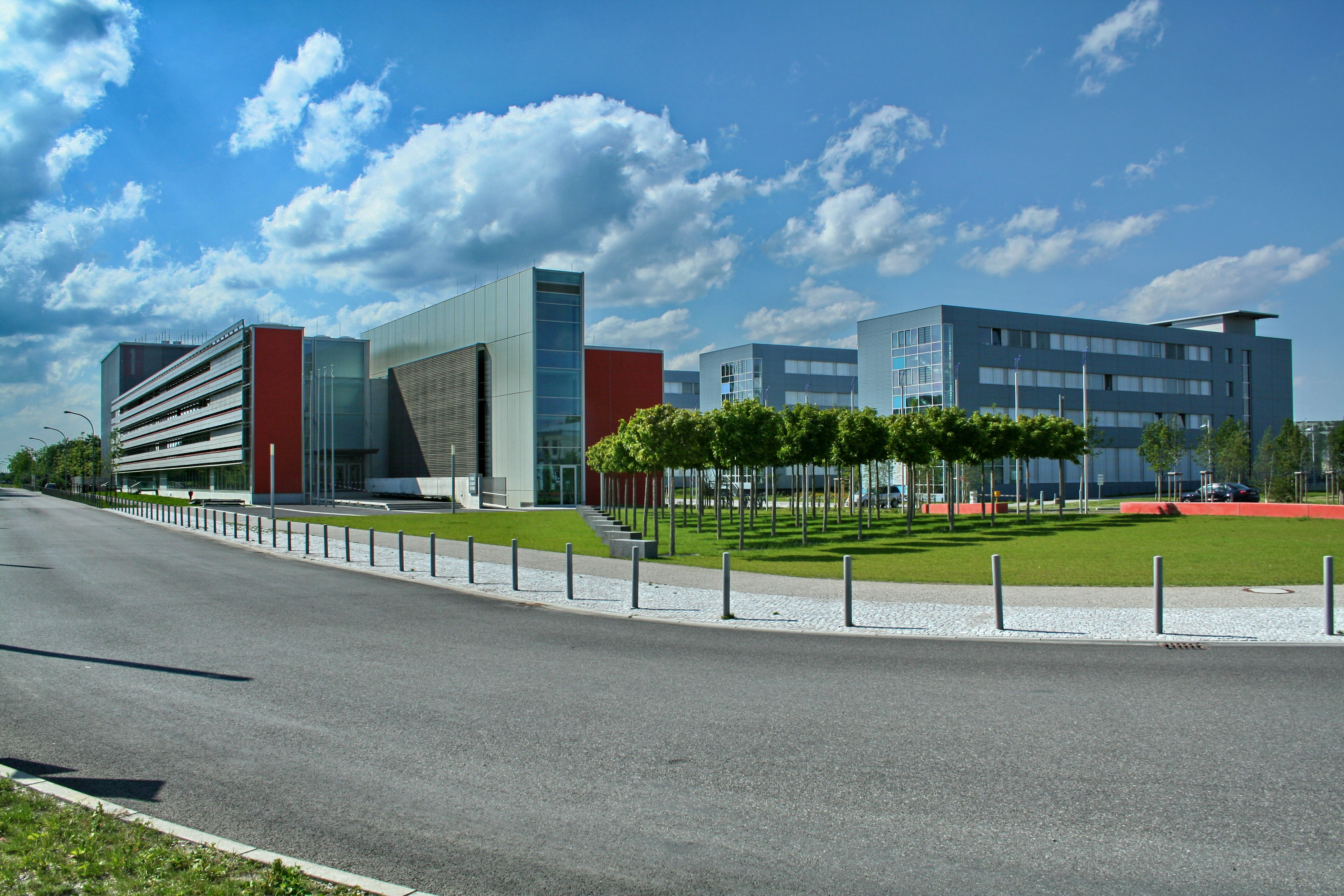 Garching